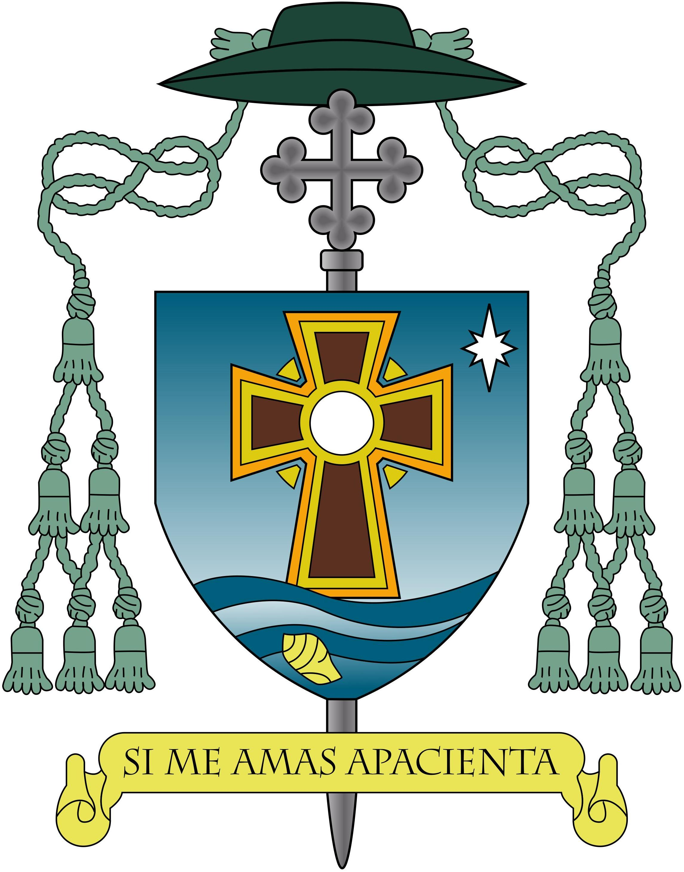 Escudo episcopal de Mons. Pedro Pablo Elizondo Cárdenas, LC